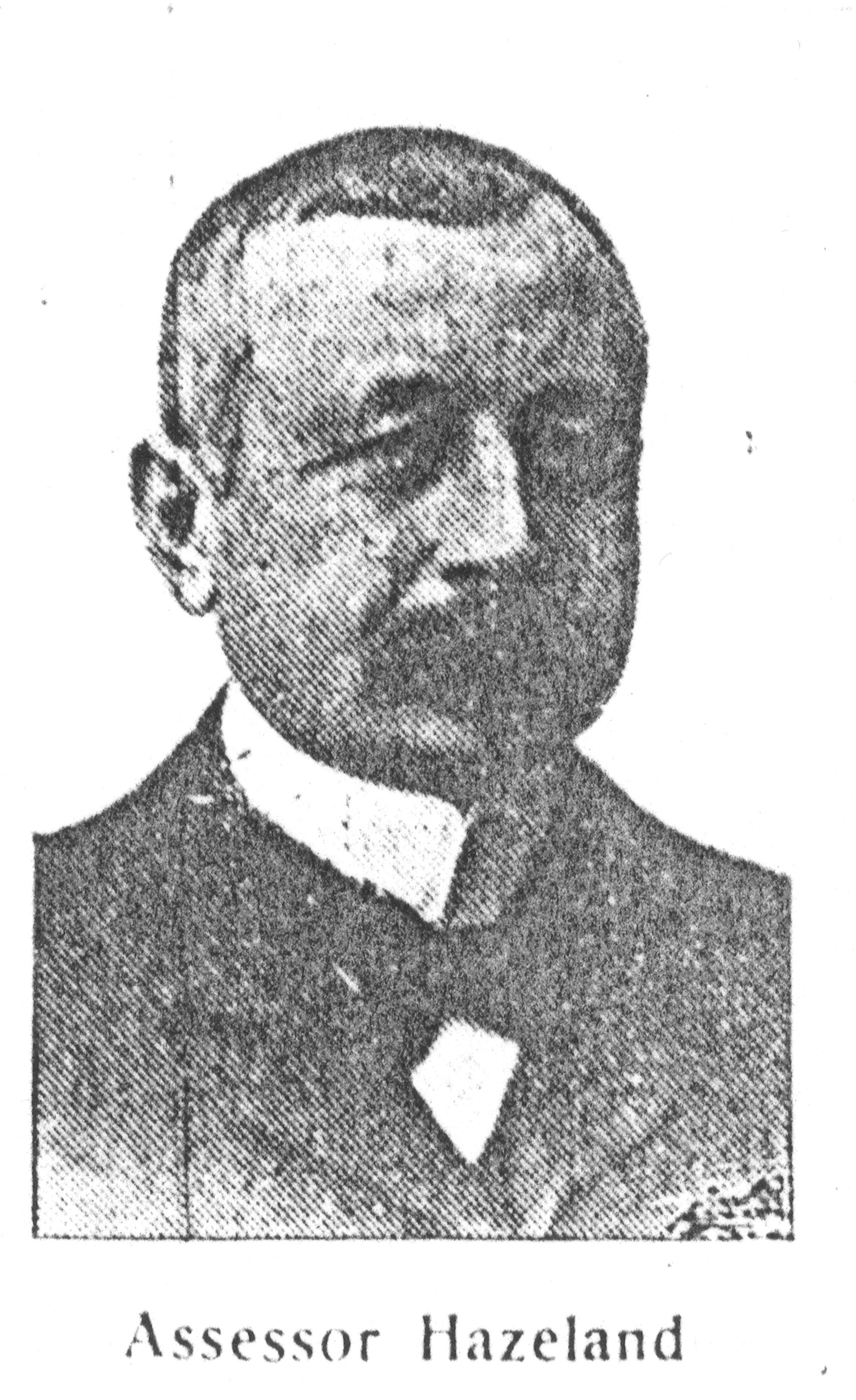 Arnold Hazeland. Fotografi i Direkte Aktion 15/1914.